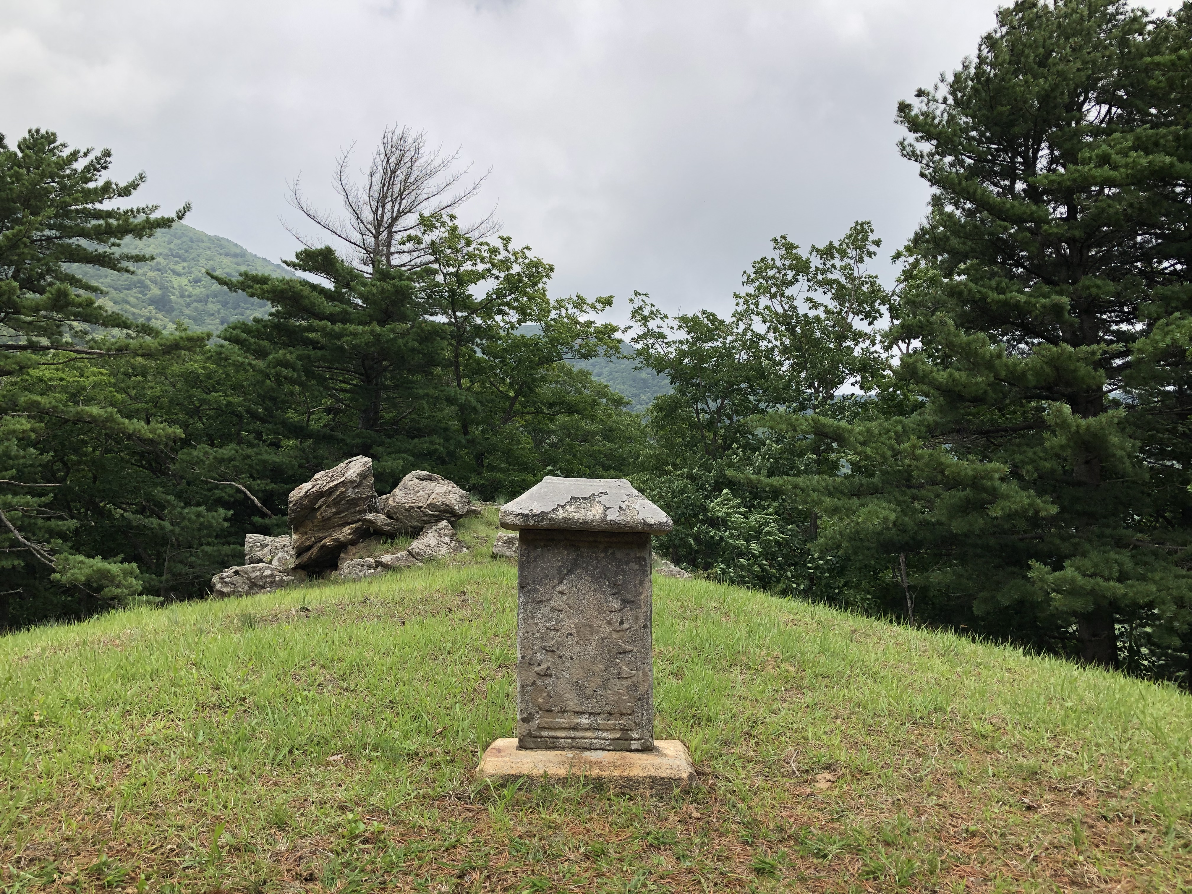 한국의 5대 적멸보궁 중에 한곳인 강원도 오대산 중대 적멸보궁